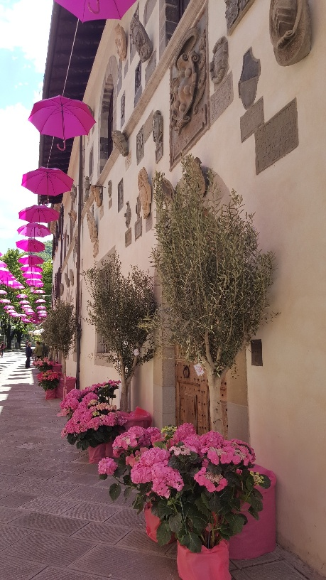 Bagno di Romagna è stata scelta per il traguardo dell'undicesima tappa del 100 Giro d'Italia (17 maggio 2017) This is a photo of a monument which is part of cultural heritage of Italy.